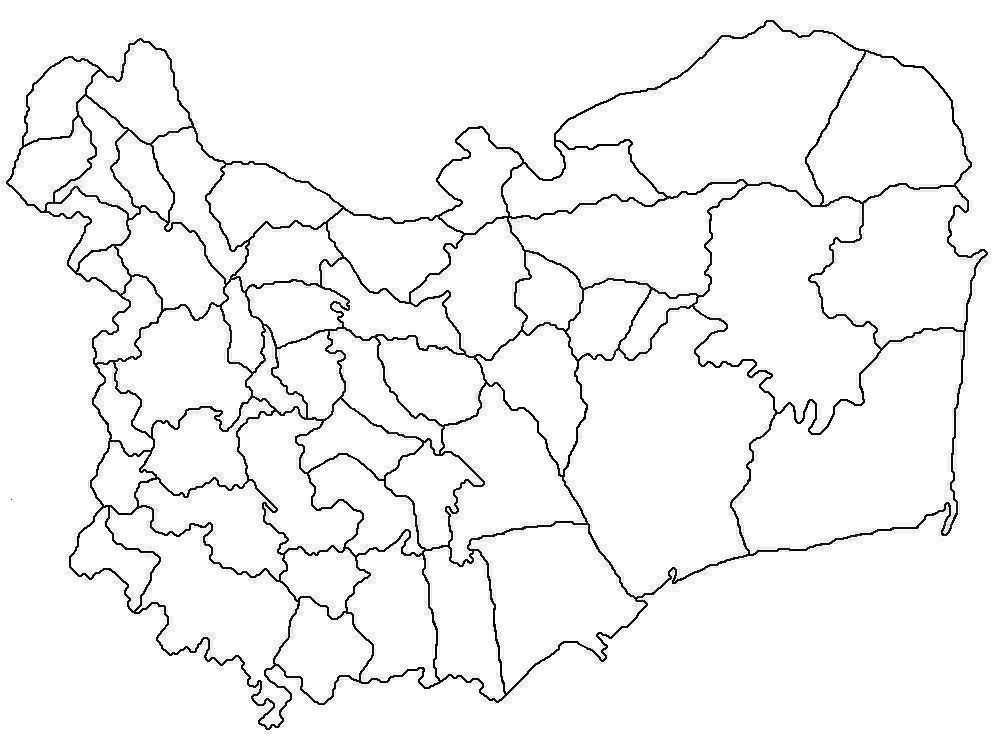 Harta judetul Tulcea Categorie:Hărţi ale judeţului Tulcea